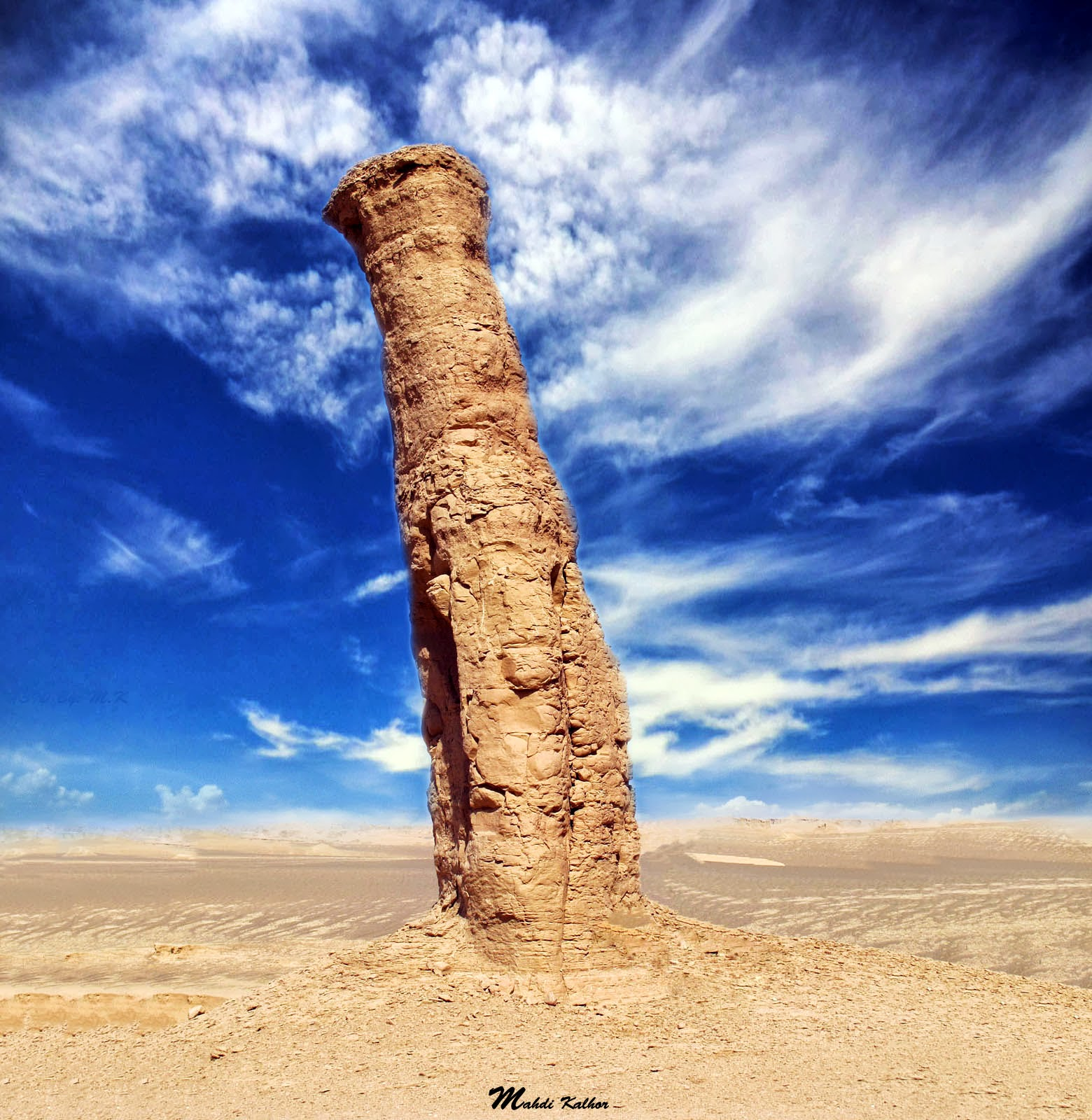 یکی از کلوت‌های کم‌نظیر موجود در دشت لوت.